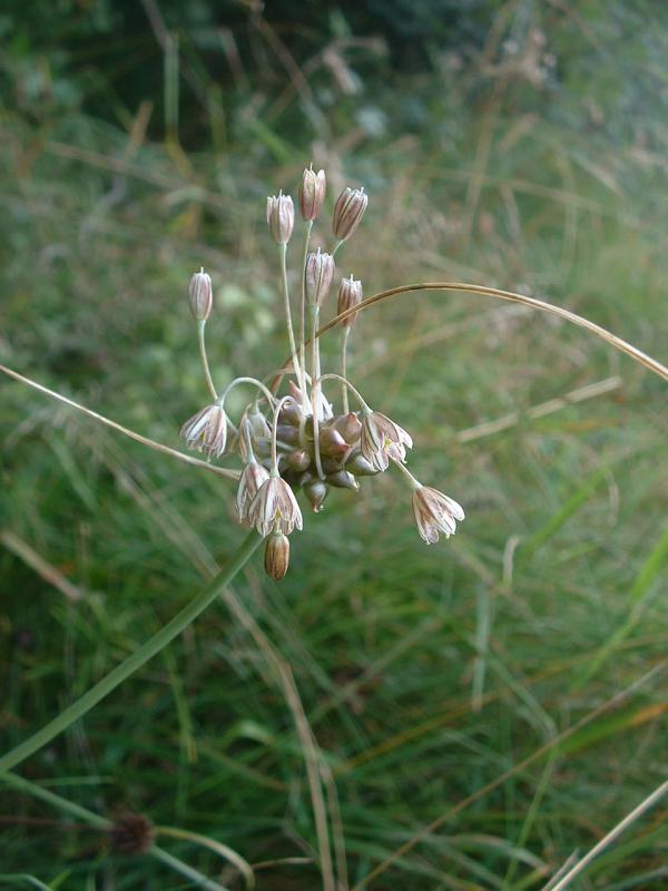 Ail des jardins, photo J.F. Gaffard, Frasne-le-Château, août 2004,Allium oleraceum